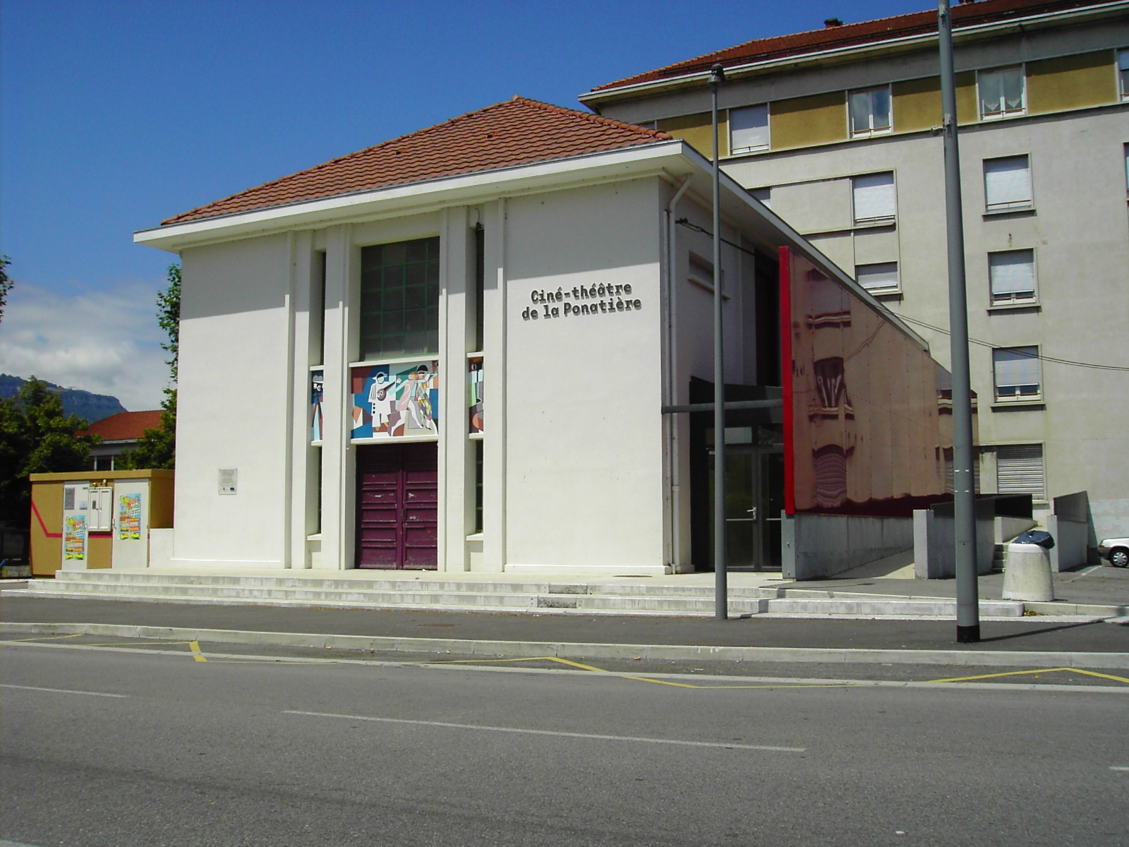 ciné-Théatre de la Ponatière - Echirolles